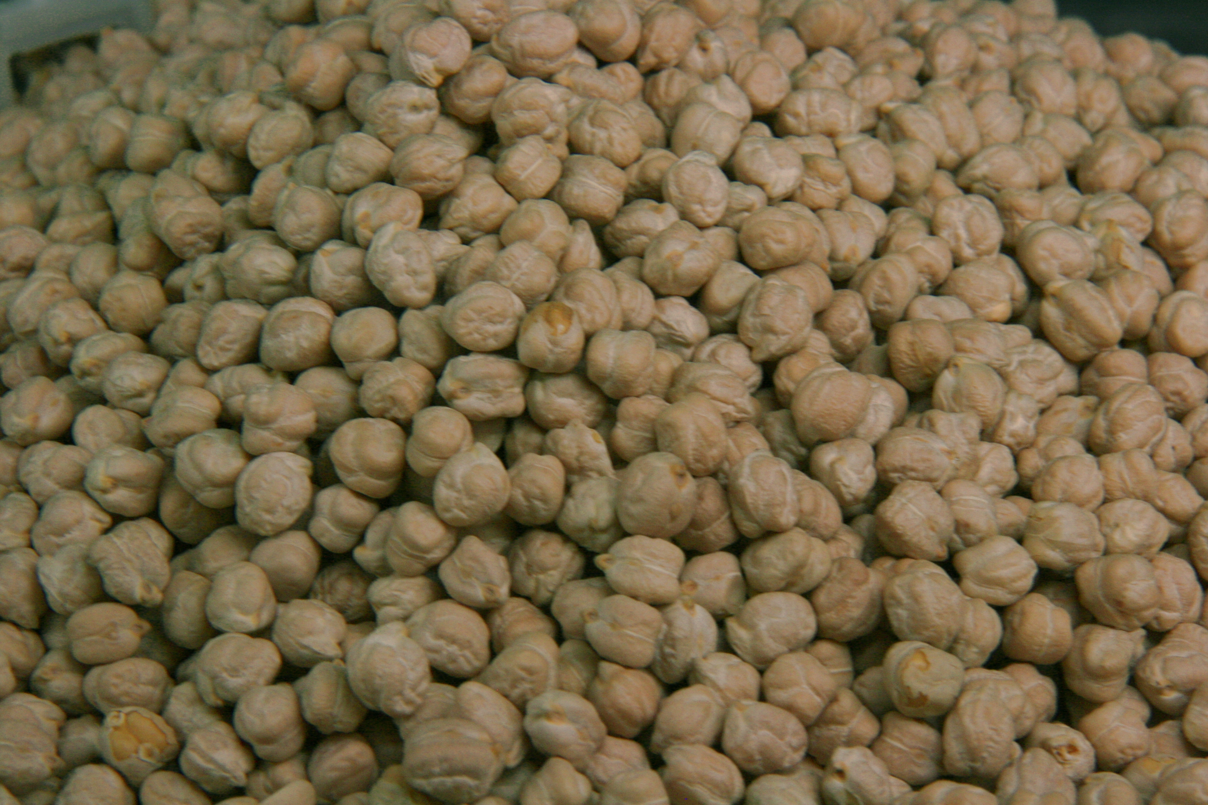 Garbanzo de Fuentesauco (Zamora)